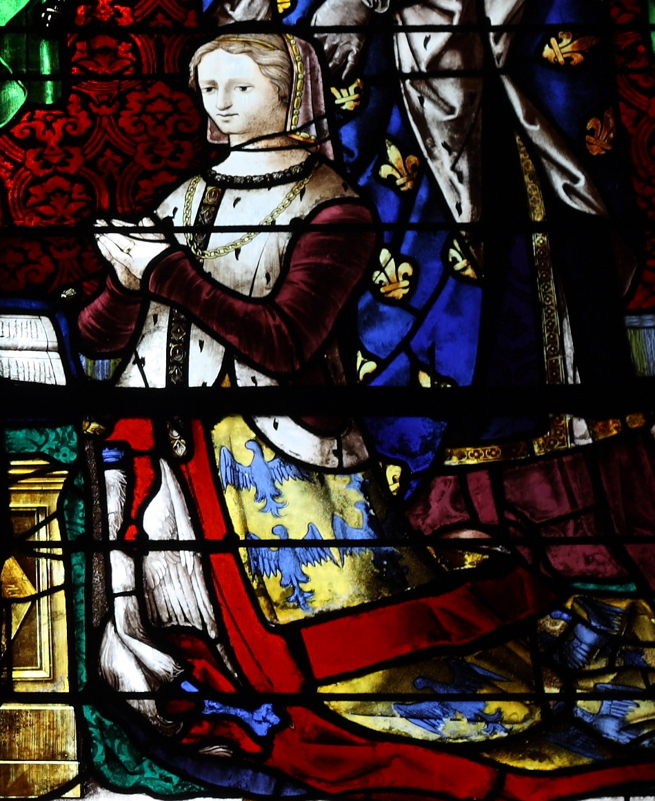 Ausschnitt des Bleiglasfensters Nr. 6 (19. Jahrhundert) in der katholischen Pfarrkirche Saint-Martin (Collégiale Saint-Martin) in Montmorency, Darstellung: Marie Louise de Montmorency und Ludwig der Heilige (siehe: Dominique Foussard, Charles Huet, Mathieu Lours: Églises du Val-d'Oise. Pays de France, Vallée de Montmorency, Société d'Histoire et d'Archéologie de Gonesse et du Pays de France, 2. Auflage, Gonesse 2011, ISBN 9782953155426)